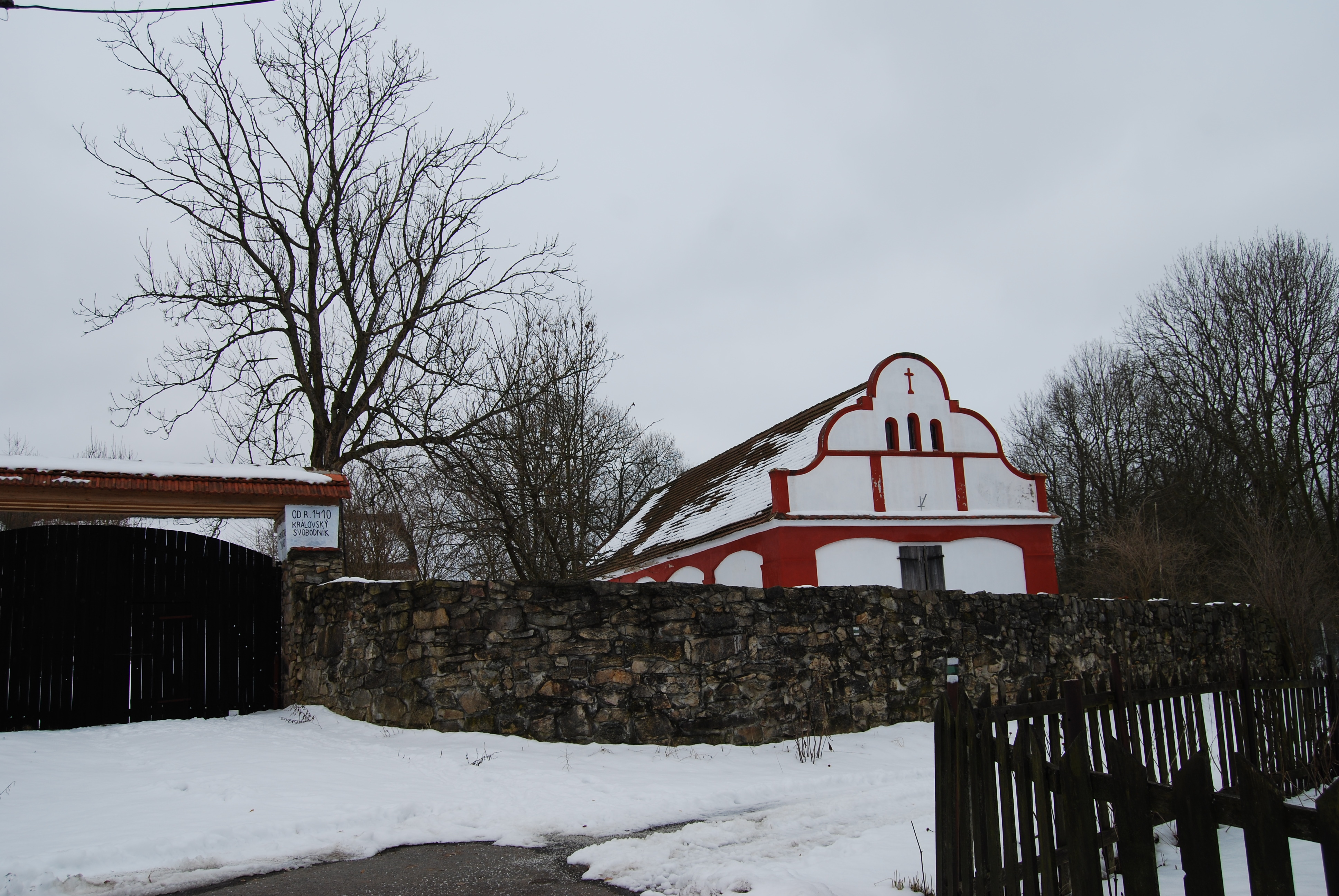 Usedlost ve vesnici poblíž návesní kaple. Rohozov je část obce Chyšky v okrese Písek. Česká republika.